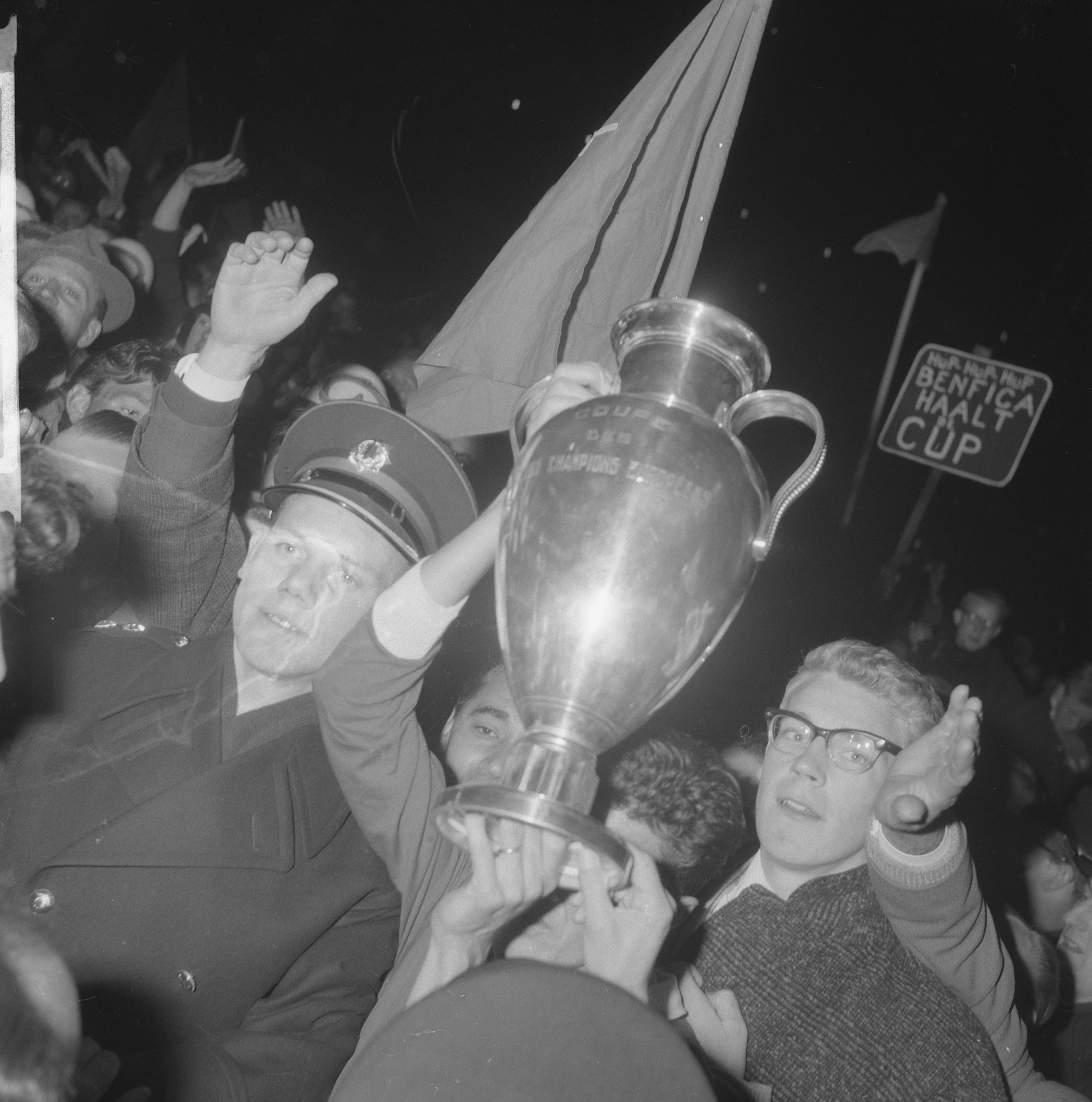 Collectie / Archief : Fotocollectie Anefo Reportage / Serie : [ onbekend ] Beschrijving : Beufica tegen Real Madrid 5-3 publiek Datum : 2 mei 1962 Trefwoorden : publiek, sport, voetbal Instellingsnaam : Real Madrid Fotograaf : Nijs, Jac. de / Anefo Auteursrechthebbende : Nationaal Archief Materiaalsoort : Negatief (zwart/wit) Nummer archiefinventaris : bekijk toegang 2.24.01.03 Bestanddeelnummer : 913-8542